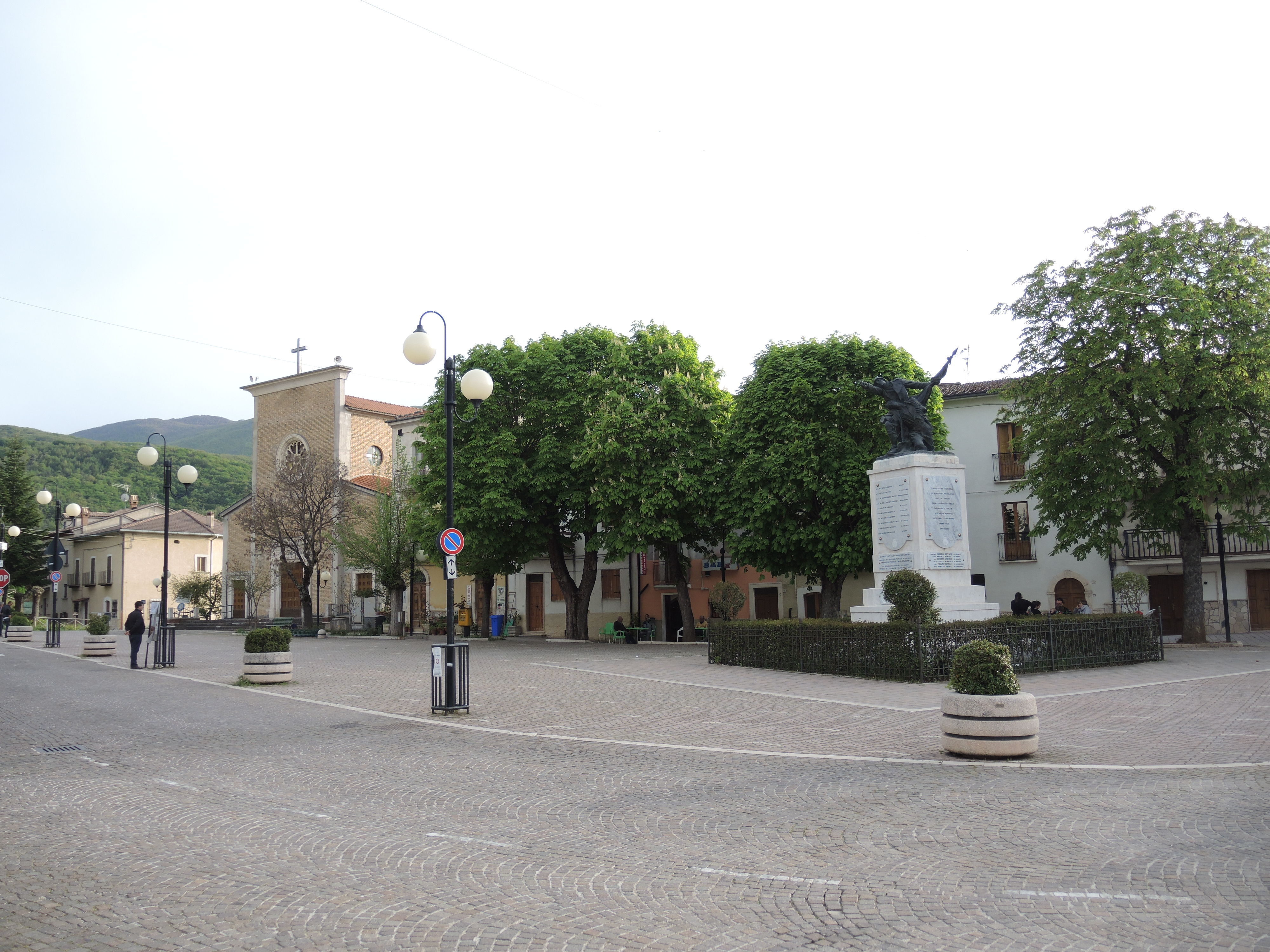 Cansano (AQ): Piazza XX Settembre